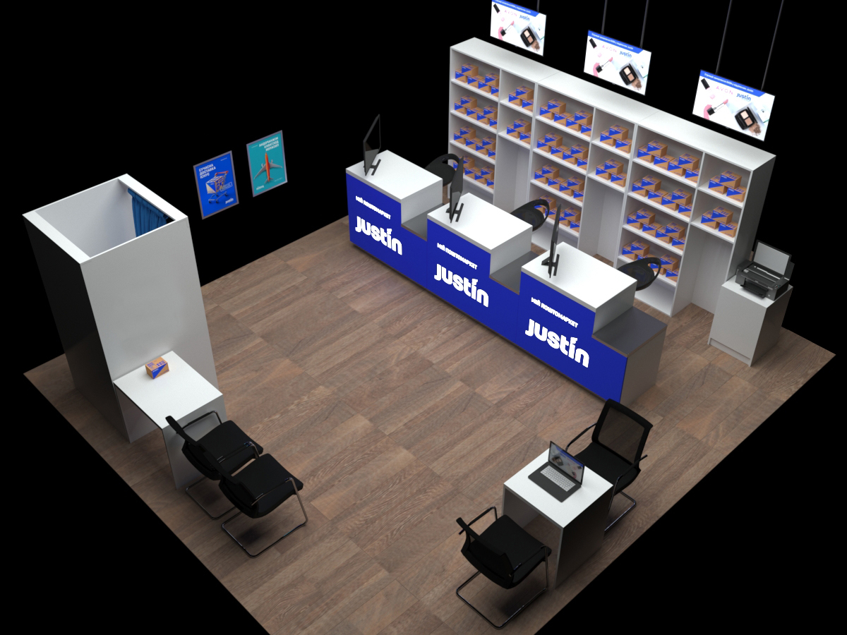 План відділеня OSR